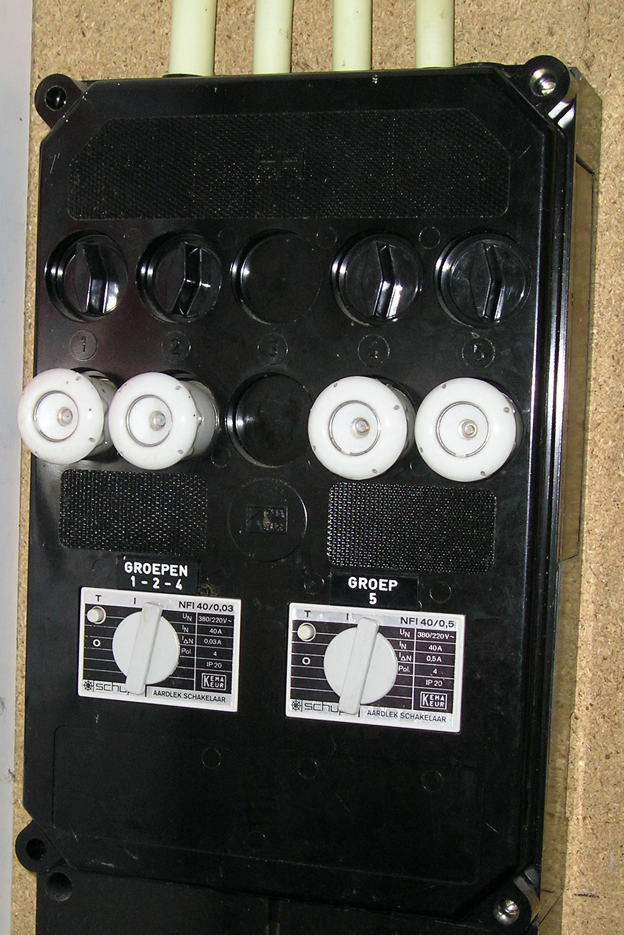 Elektro verdeelinrichting woonhuis Nederland. 4x Groep 16A 2x Differentiaalschakelaar (Groep 1+2+4 samen. Groep 5 heeft hogere lekstroom ten behoeve van wasautomaat)